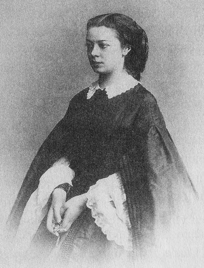 Алекса́ндра Серге́евна Альбединская, урождённая княжна Долгорукова (18 (30) ноября 1834 — 12 сентября 1913) — фрейлина императрицы Марии Александровны. Фаворитка императора Александра II (с начала 1850-х до 1862 года)[1]. Статс-дама (1896). Кавалерственная дама ордена Святой Екатерины.